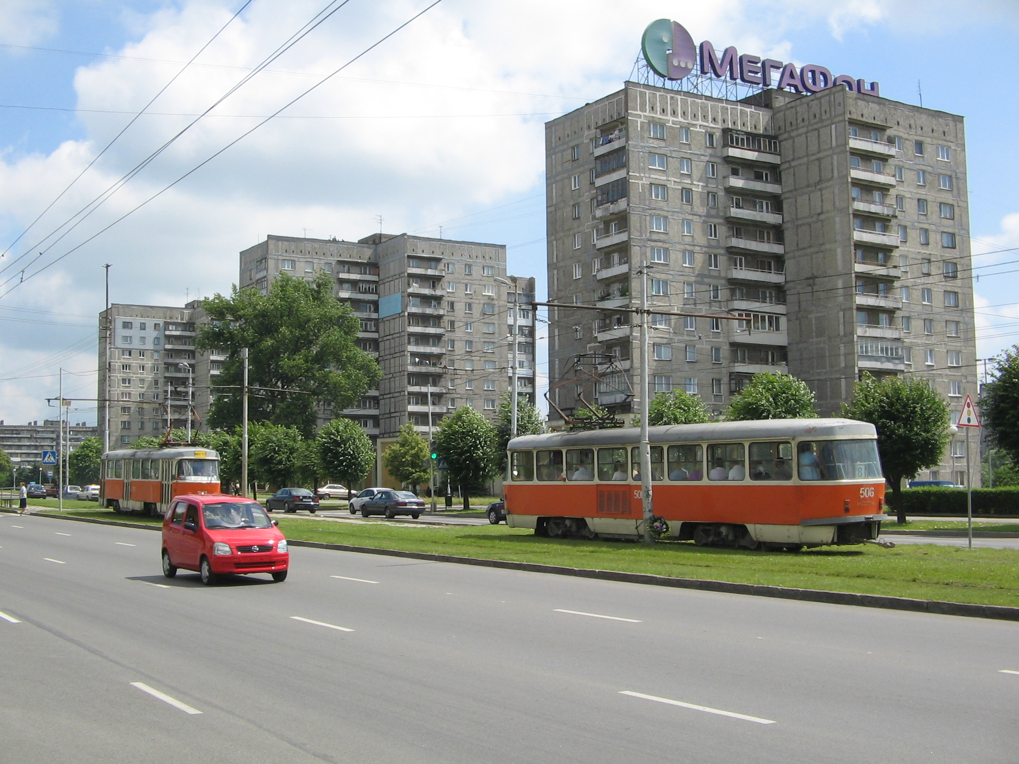 Трамваи на Московском проспекте в Калининграде.